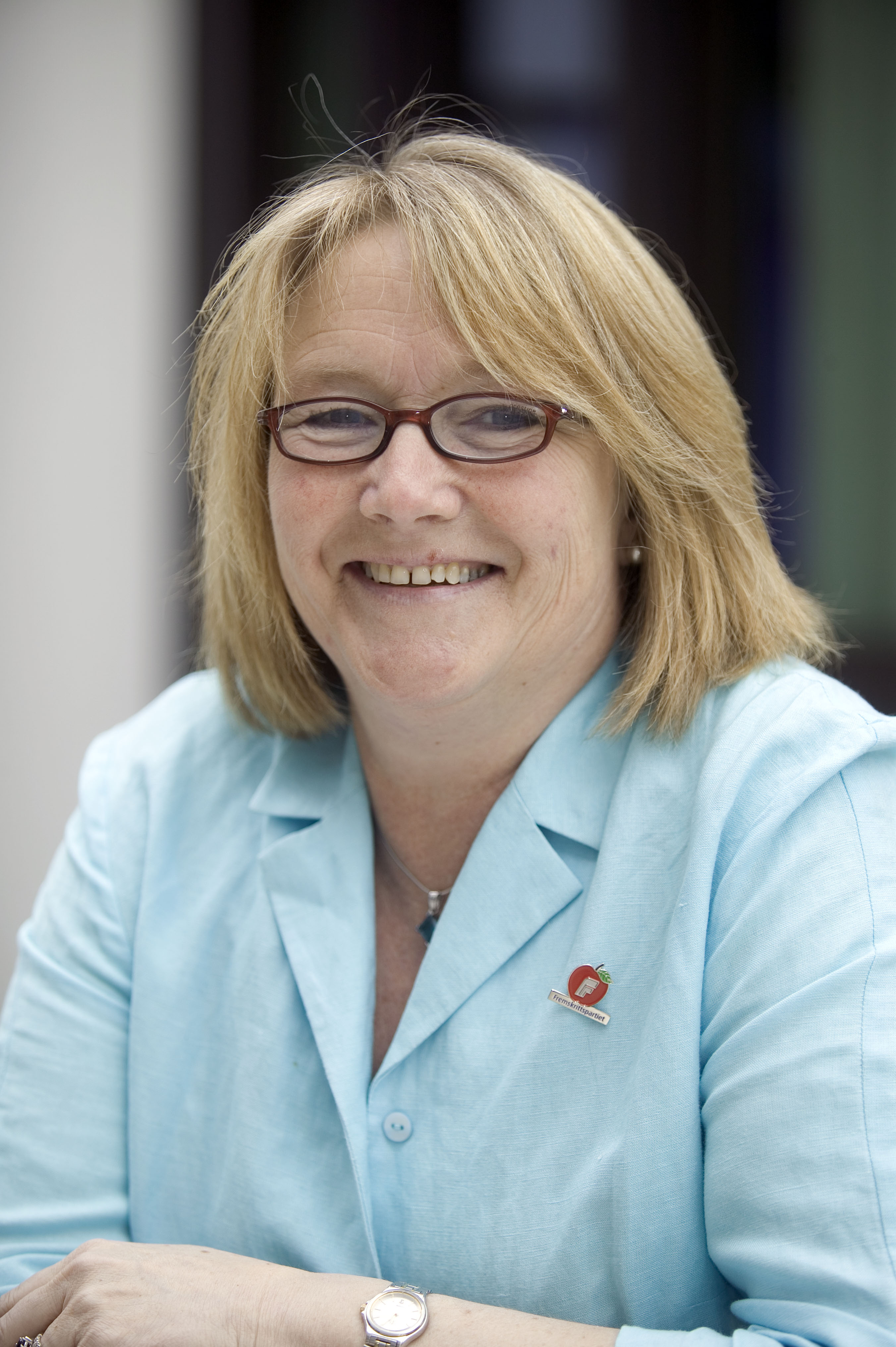 Karin S. Woldseth